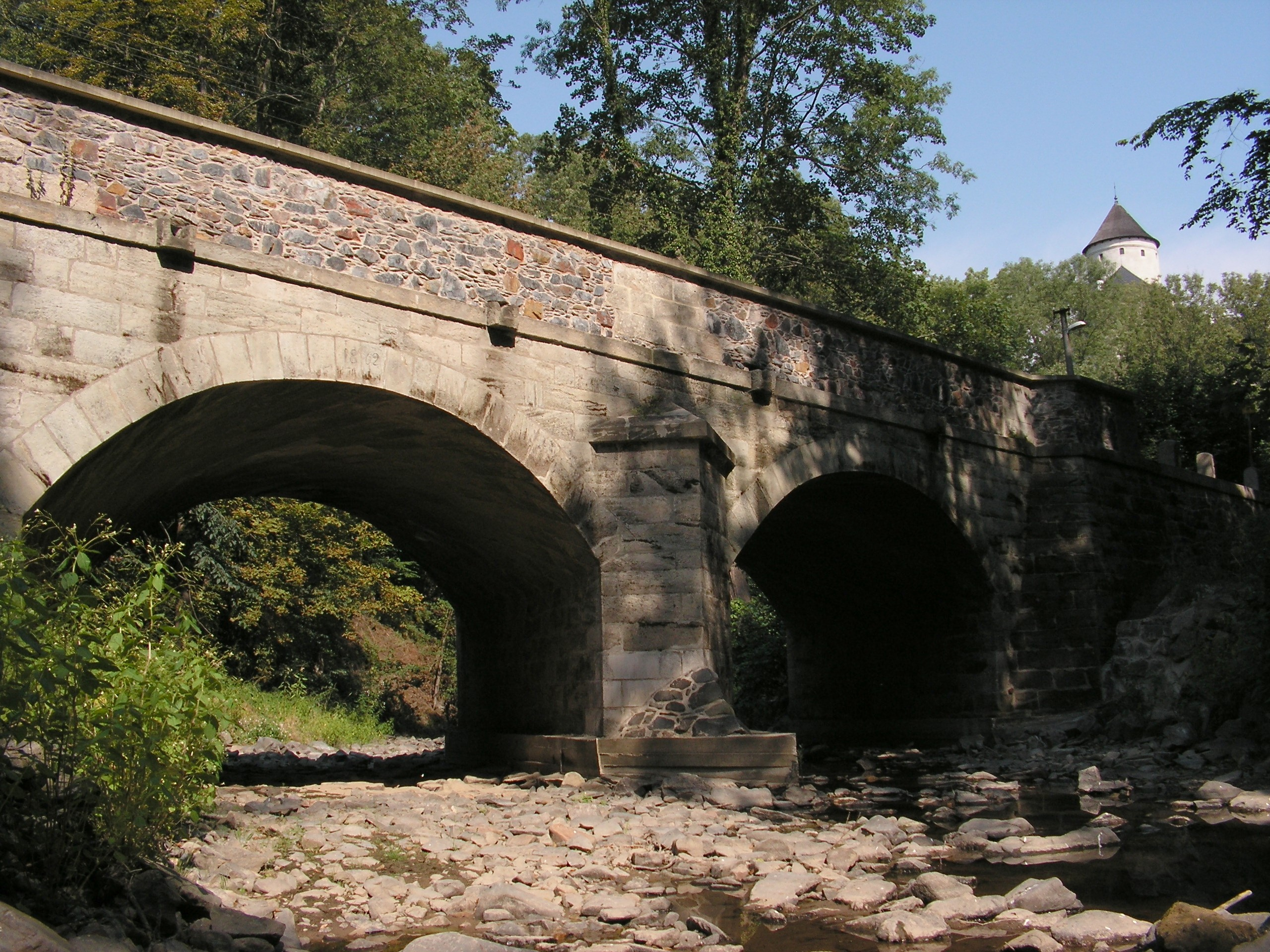 Krounka pod hradem Rychmburk za extrémně nízkého stavu v srpnu 2015